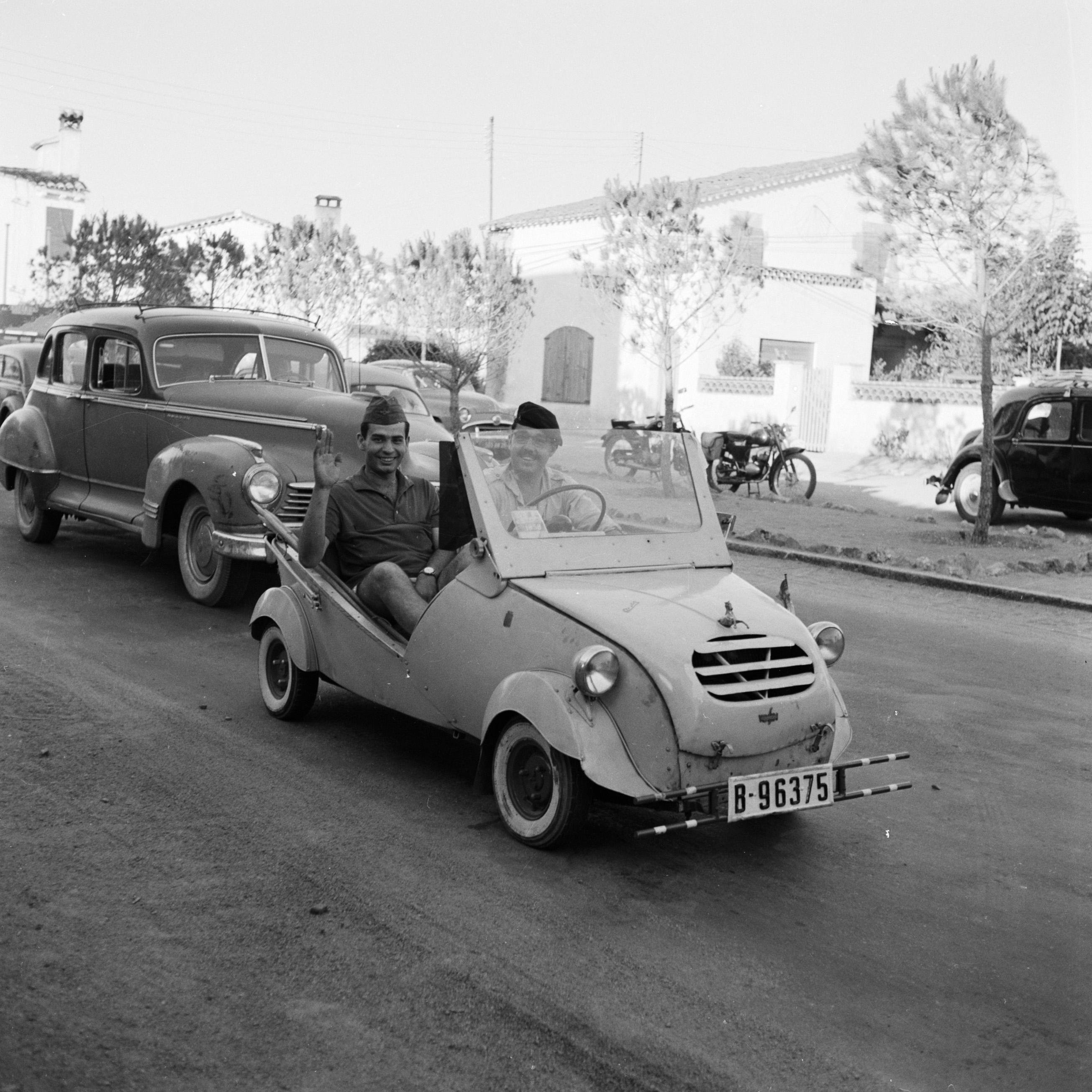 Collectie / Archief : Fotocollectie Van de Poll Reportage / Serie : Oude auto's in Spanje Beschrijving : Twee mannen rijden in de gerepareerde Voisin Datum : 1958 Locatie : Spanje Trefwoorden : auto's, inheemse bevolking, straatbeelden Fotograaf : Poll, Willem van de Auteursrechthebbende : Nationaal Archief Materiaalsoort : Negatief (6x6) Nummer archiefinventaris : bekijk toegang 2.24.14.02 Bestanddeelnummer : 254-0735